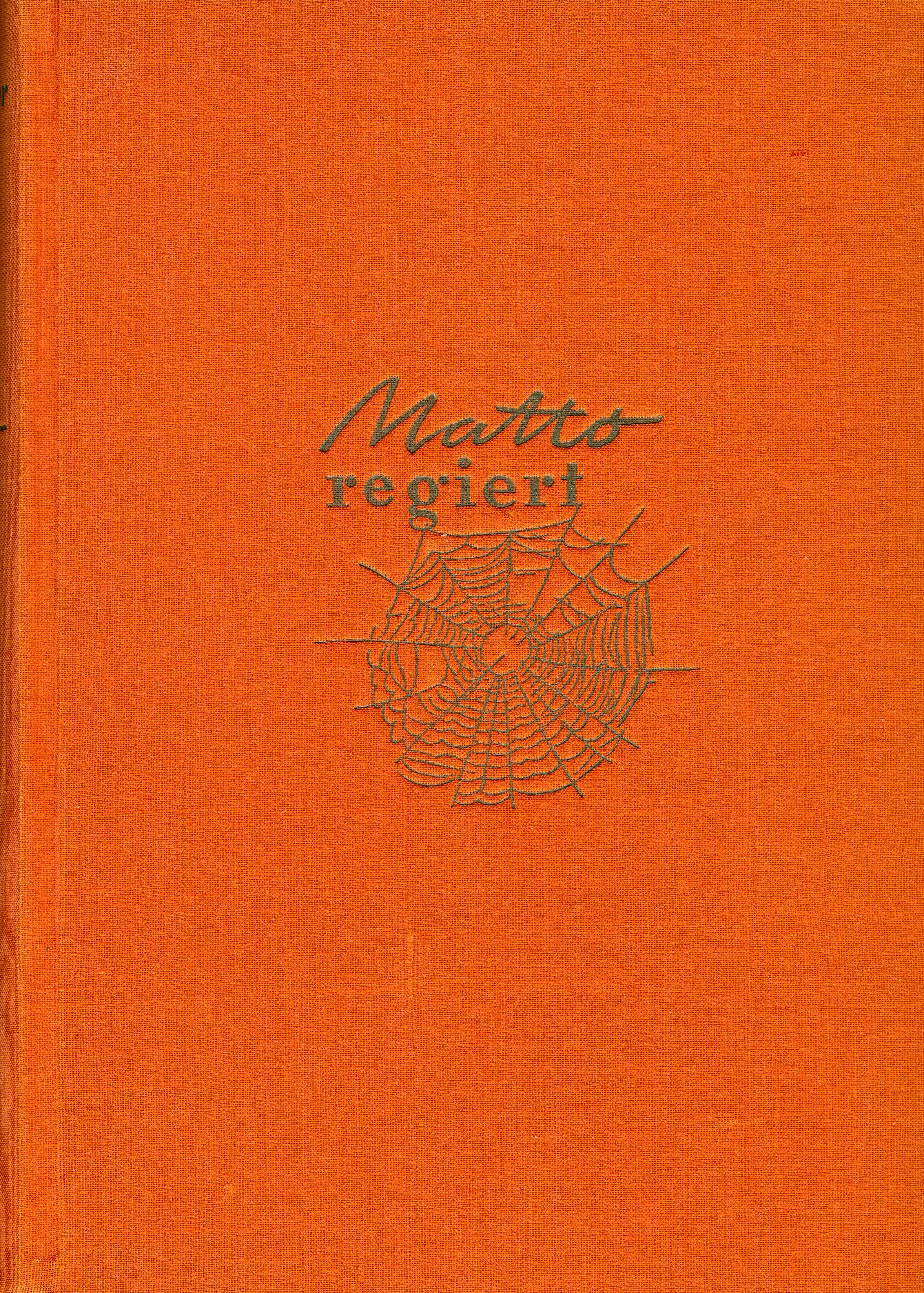 "Matto regiert" in der Buchausgabe (ohne SU) des "Schweizer Druck- und Verlagshaus", Zürich 1943. Verlag wurde übernommen vom Oesch Verlag, Zürich